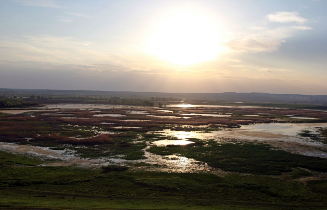 Savaşın geçtiği bölgenin şimdiki hali